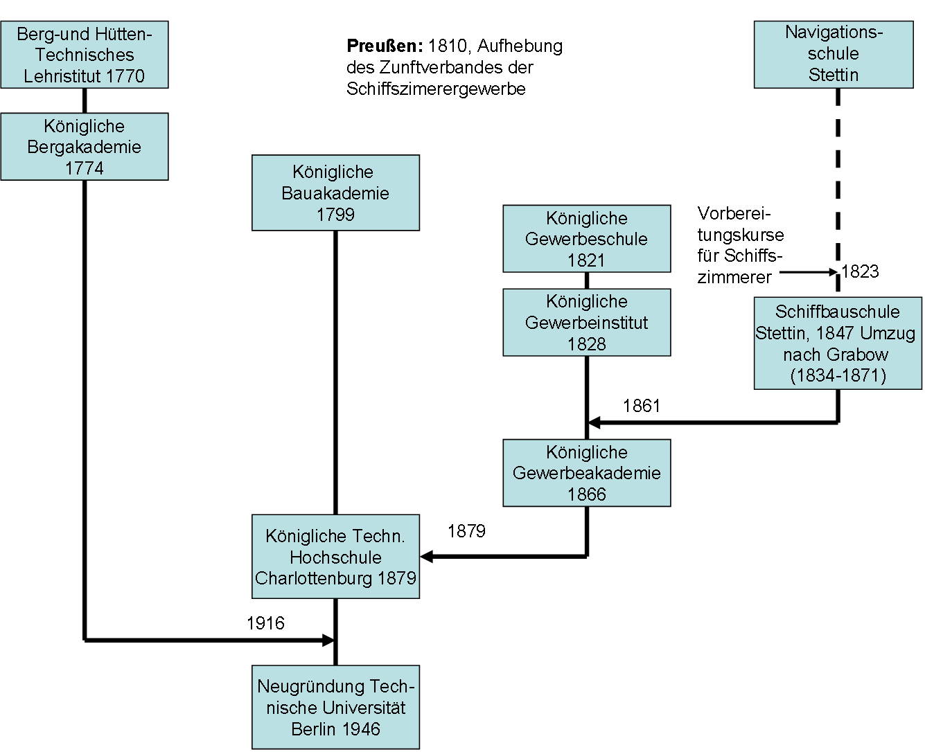 Schiffbauausbildung TU Berlin